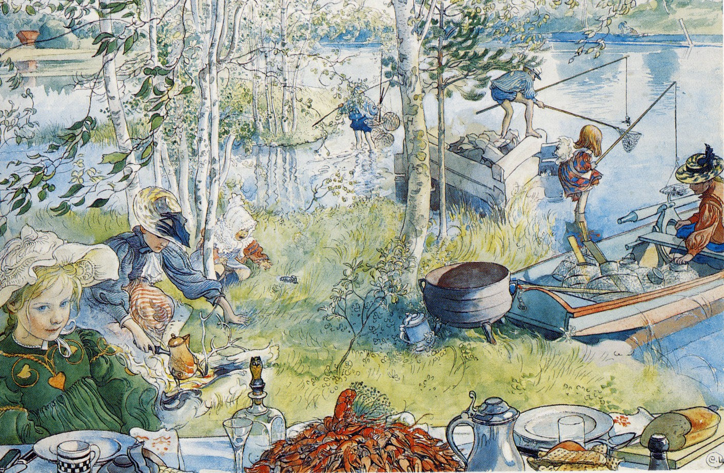 Der Krebsfangtitle QS:P1476,de:"Der Krebsfang" label QS:Lde,"Der Krebsfang"